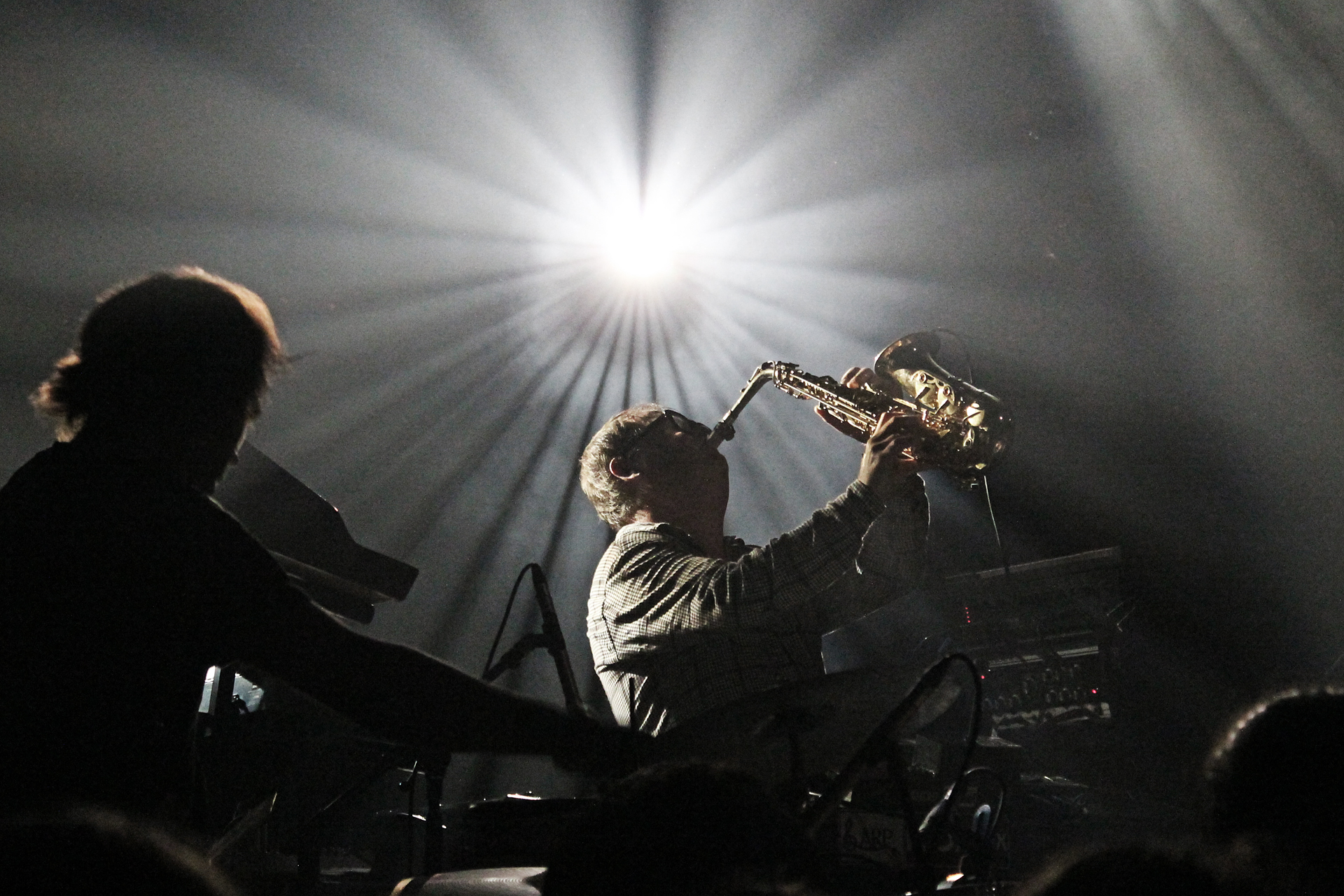 Concert de Zombie Zombie pour Le Circuit au Confort Moderne - Poitiers, octobre 2012.